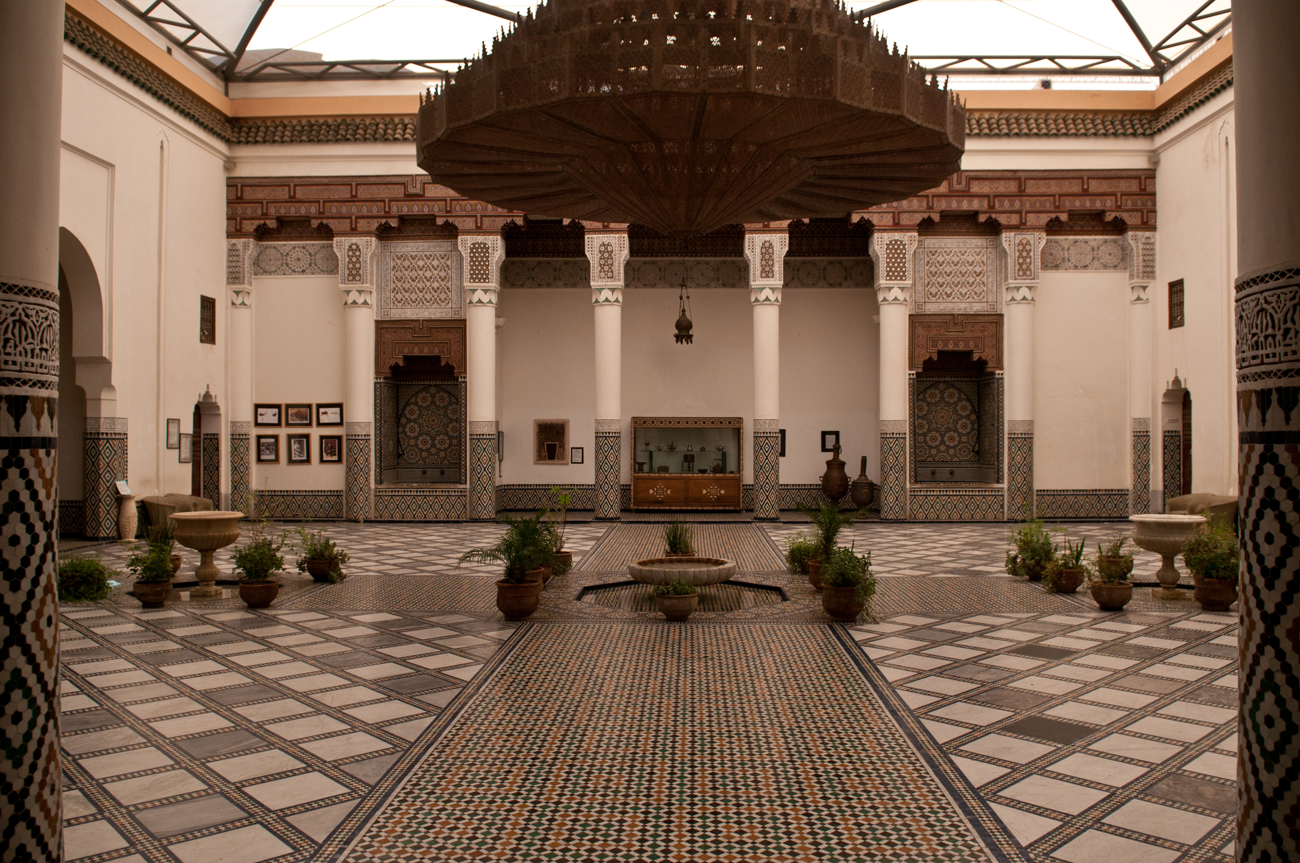 Marrakesh Museum